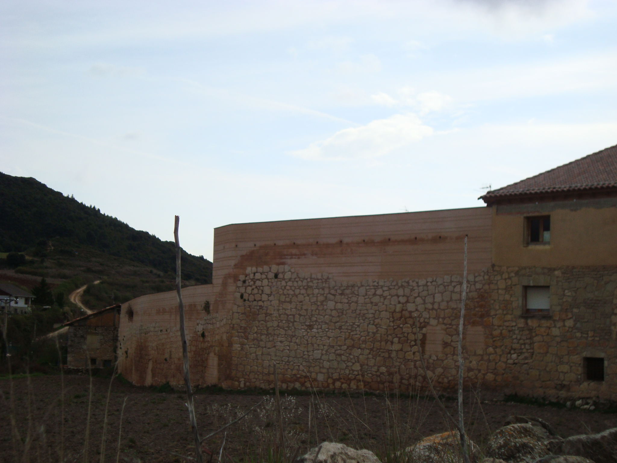 Gatzaga Buradongo harresi zaharberritua